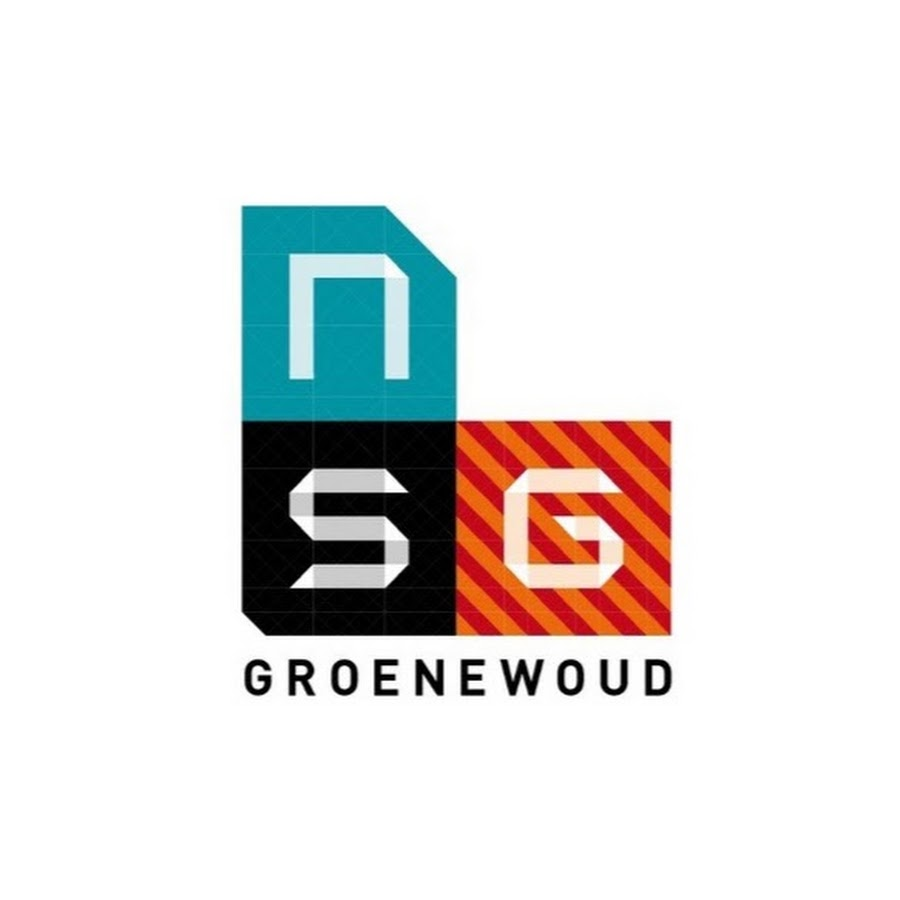 Logo van Nijmeegse scholen Gemeenschap Groenewoud